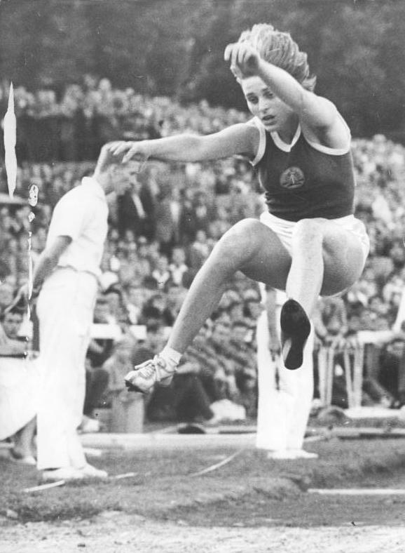 Hildrun Claus Zentralbild Kohls 10.8.1960 Teilnehmer der XVII. Olympischen Sommerspiele 1960 in Rom Für die gemeinsame deutsche Mannschaft zu den XVII. Olympischen Sommerspielen 1960 in Rom wurden nach den Olympia Ausscheidungen in Hannover und Erfurt zwischen den Sportlern Westdeutschlands und der DDR in der Leichtathletik jeweils die ersten Drei den einzelnen Disziplinen, wenn die Sportler die Olympia-Norm bereits erfüllt haben nominiert. UBz: Hildruth Claus (DDR) startet im Weitsprung.